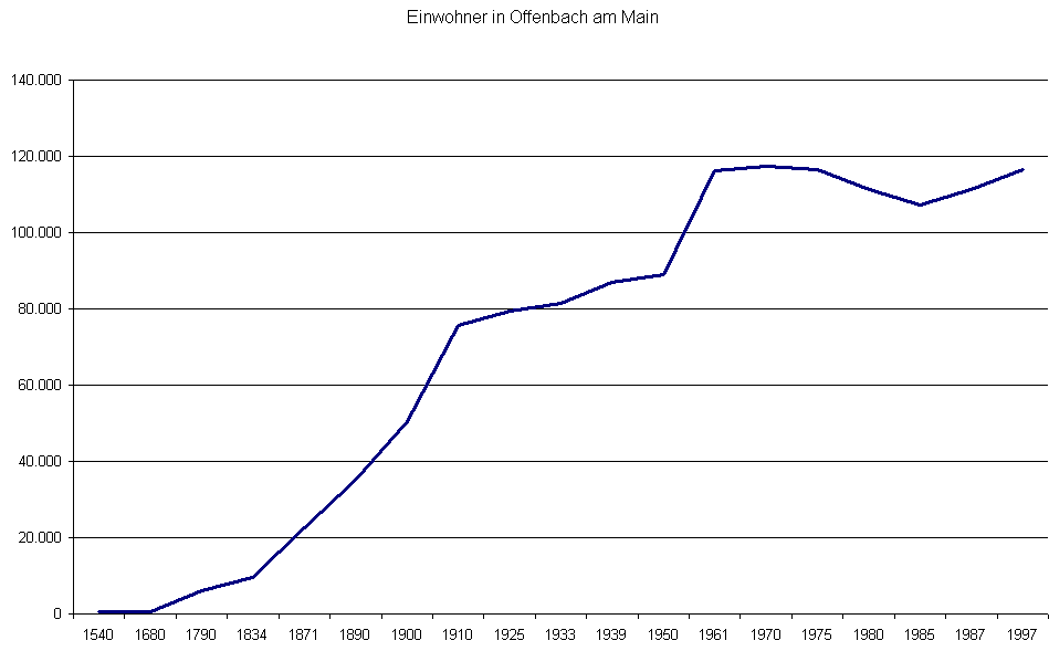 Ein Diagramm der Bevölkerungsentwicklung in Offenbach am Main.